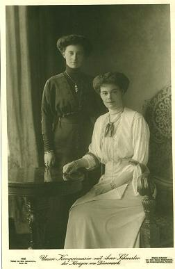 Alexandrine von Mecklenburg-Schwerin (1879−1952) zusammen mit ihrer Schwester Schwester Cecilie.